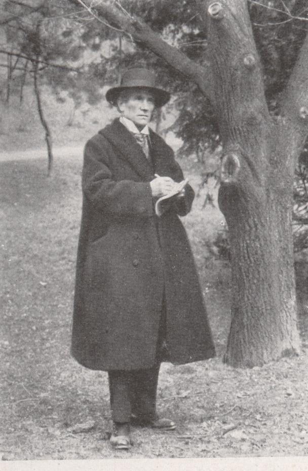 Pfälzer Heimatdichter August Heinrich, genannt "Bellemer Heiner"